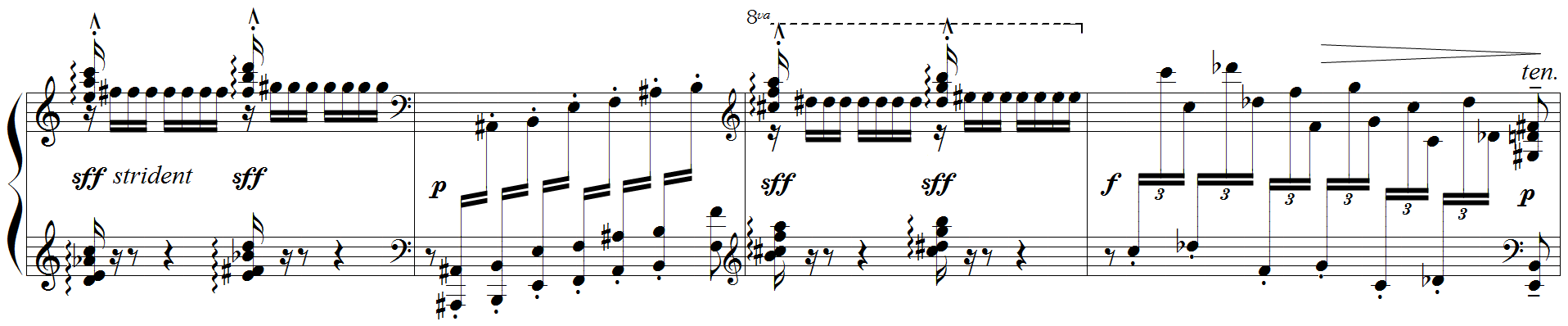 Debussy - Etude "pour les notes répétées", mes.40-43